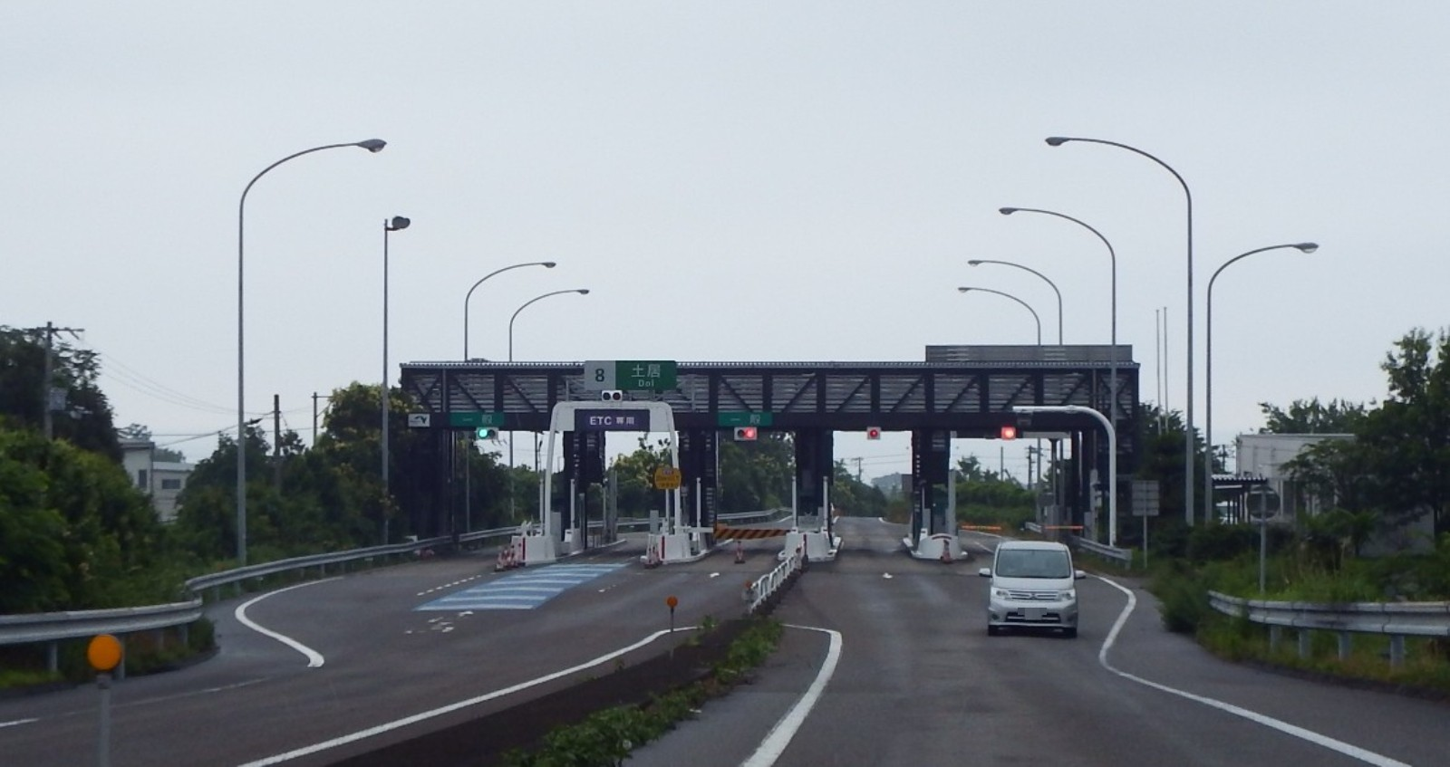 土居インターチェンジの出口